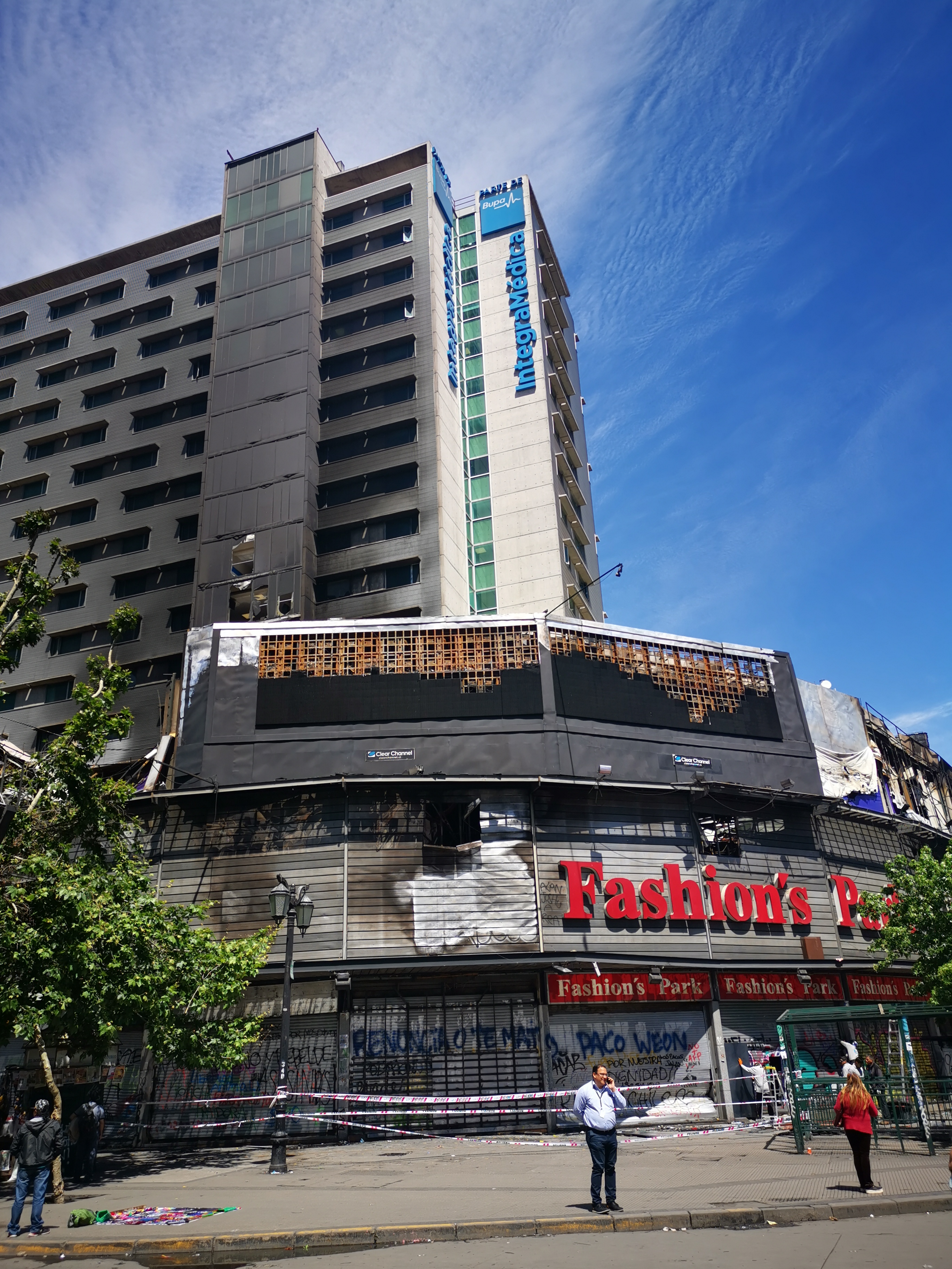 Incendio en centro comercial y clínica ubicadas en la esquina de Avenida Santa Rosa y la Alameda en Santiago, durante las protestas en Chile de 2019.